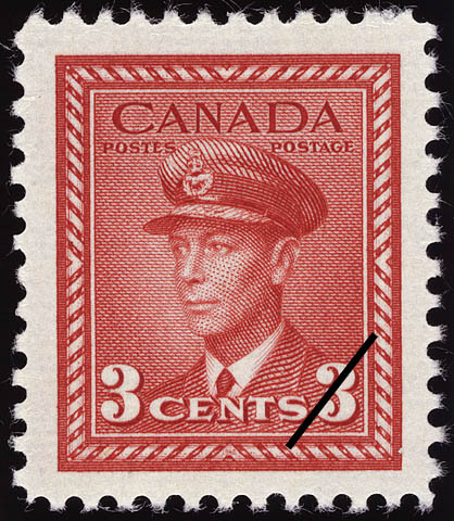 Timbre Poste Canada 3 cents George VI 1942